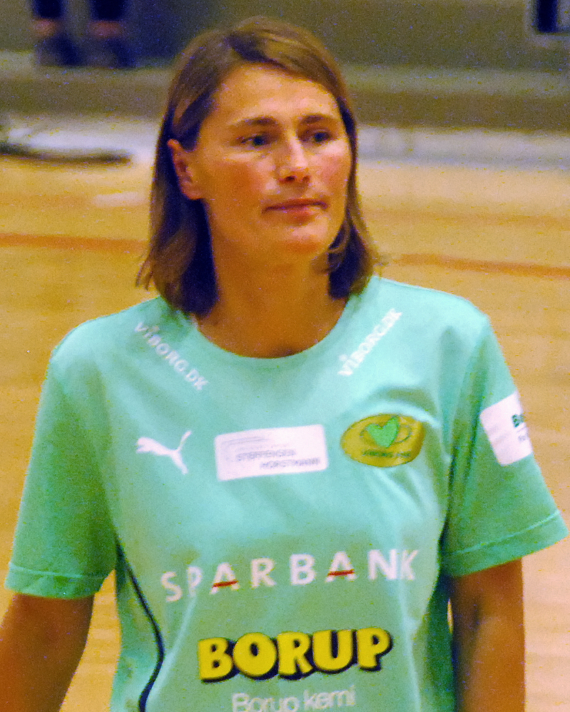 Håndboldtræner Anja Andersen fra Viborg Håndboldklub. Her i Viborg Stadionhal.